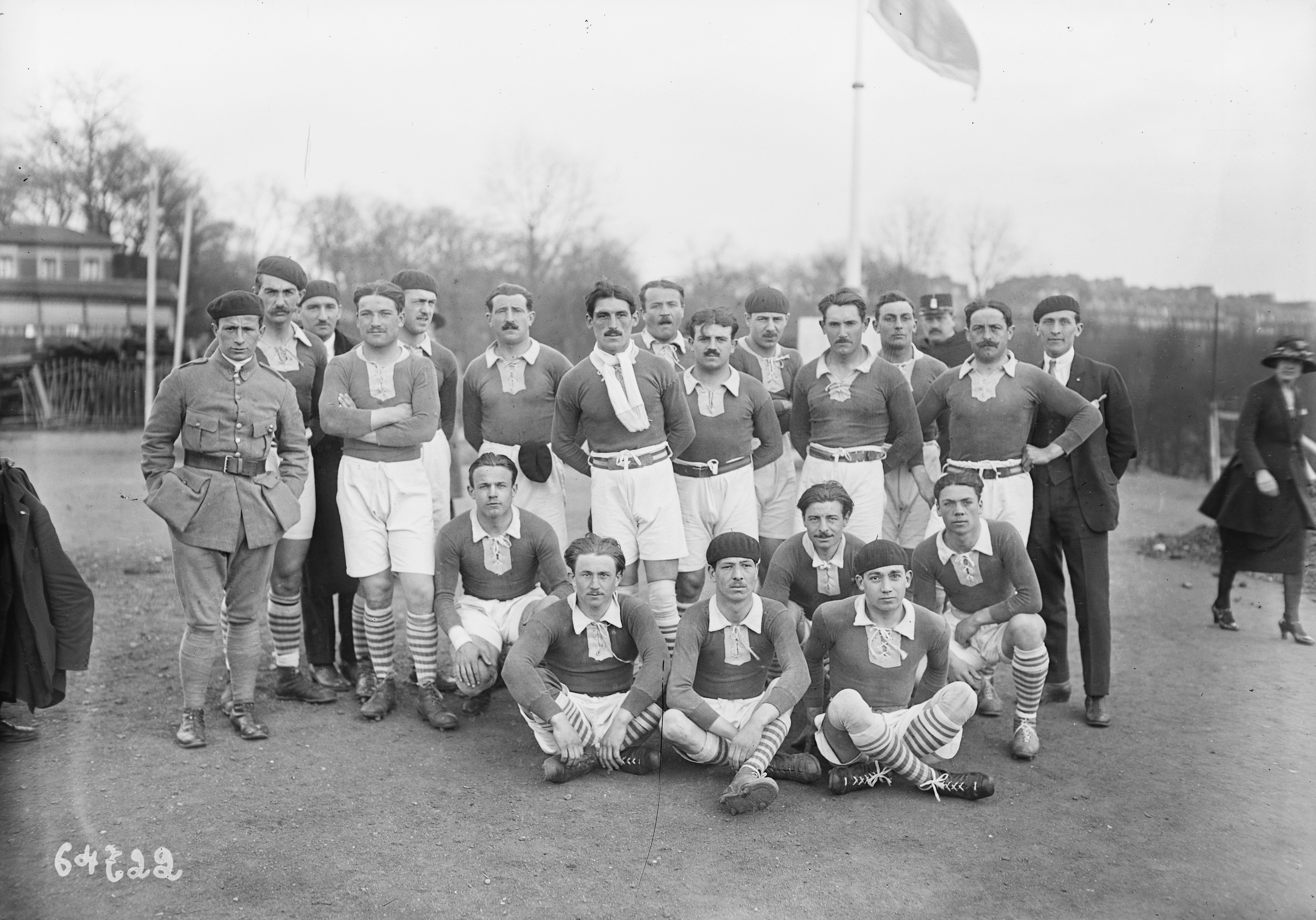 La Section paloise en 1921 au stade Bergeyre